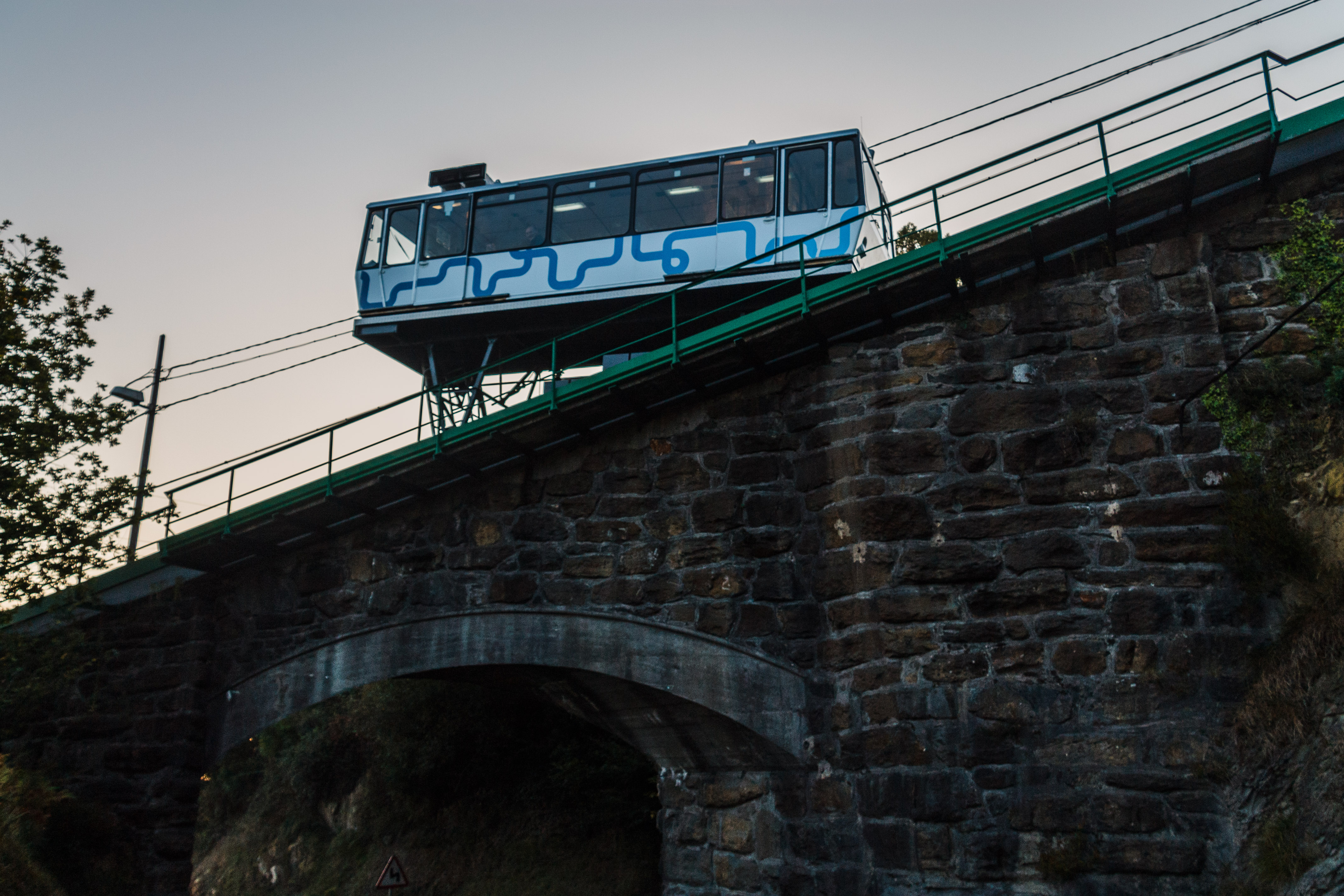 Zugaztietarako errepideko zubia